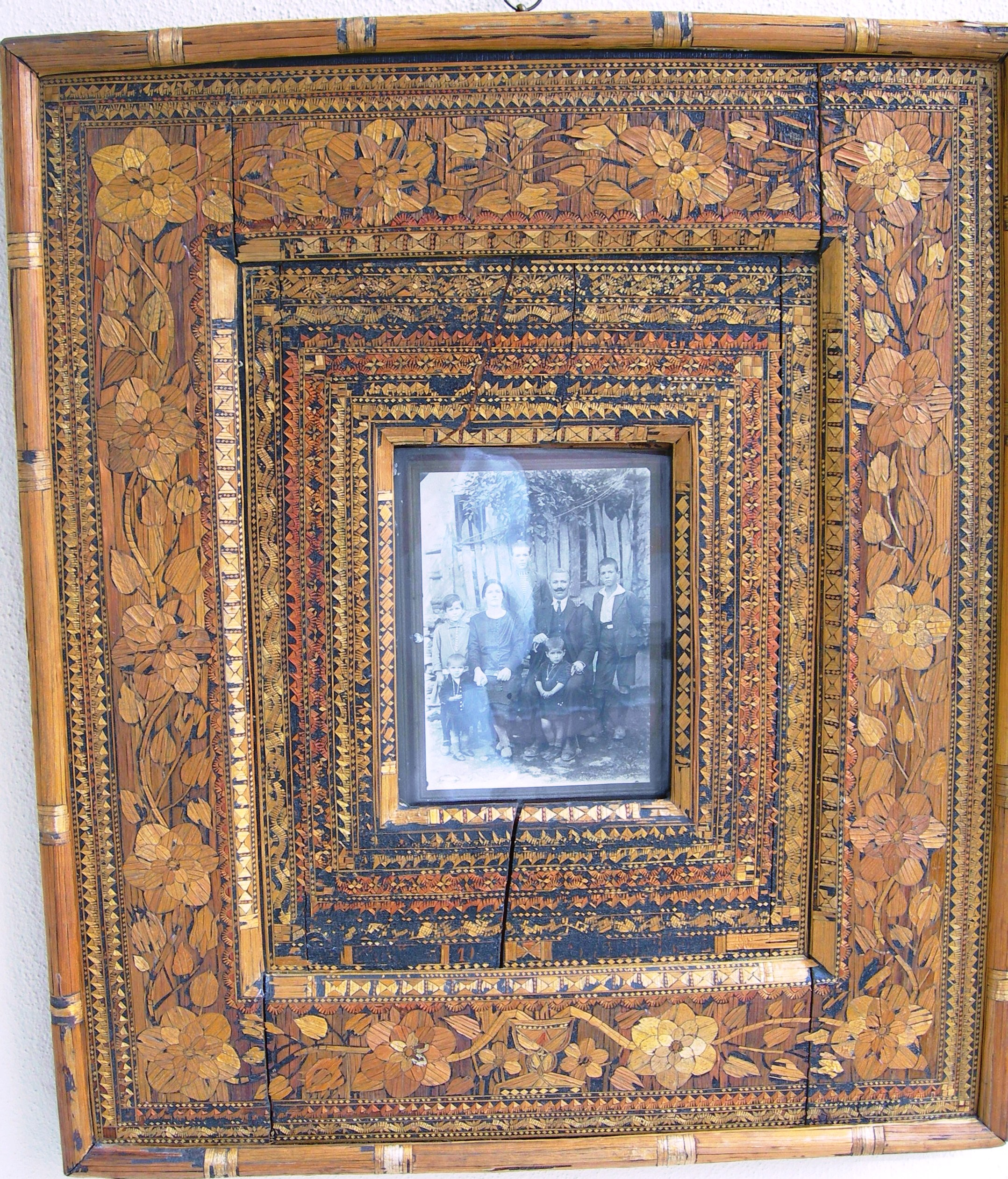 Κορνίζα δωρηθείσα στον Λάζαρο Τσάμη απο καπετάν Κώττα